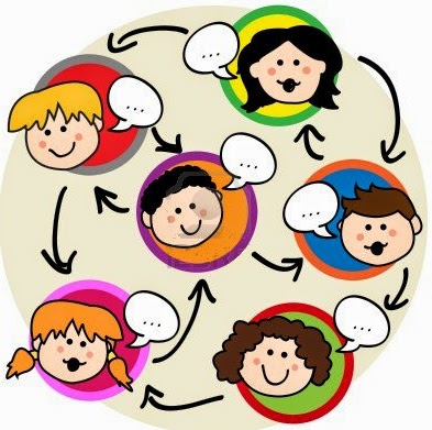 Constituye la forma natural de comunicarse de las personas, todo ser humano tiene la capacidad de comunicarse mediante sonidos articulados